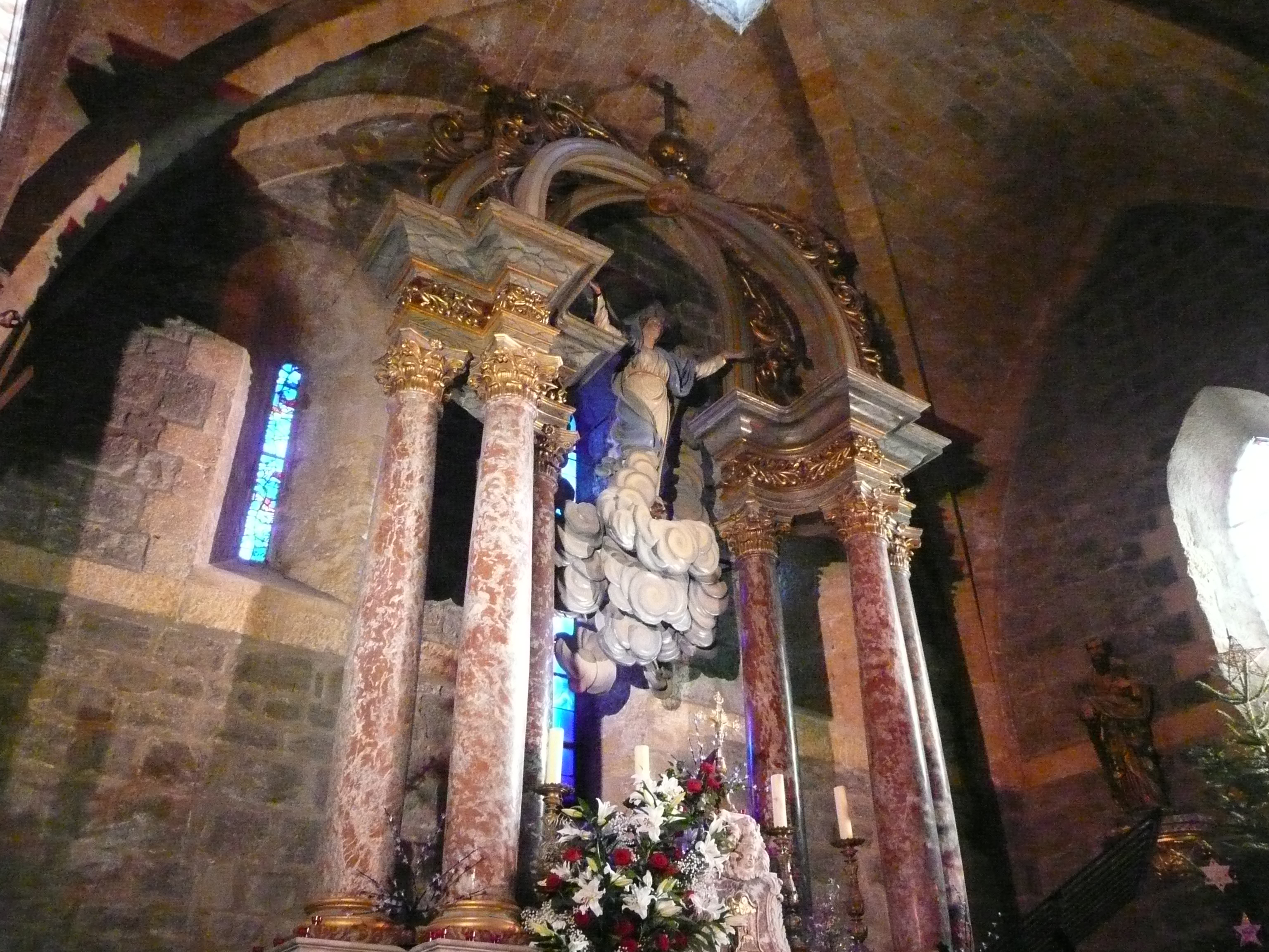 Ciborium (baldaquin) de l'église Notre-Dame de l'Assomption à Gruissan (France)